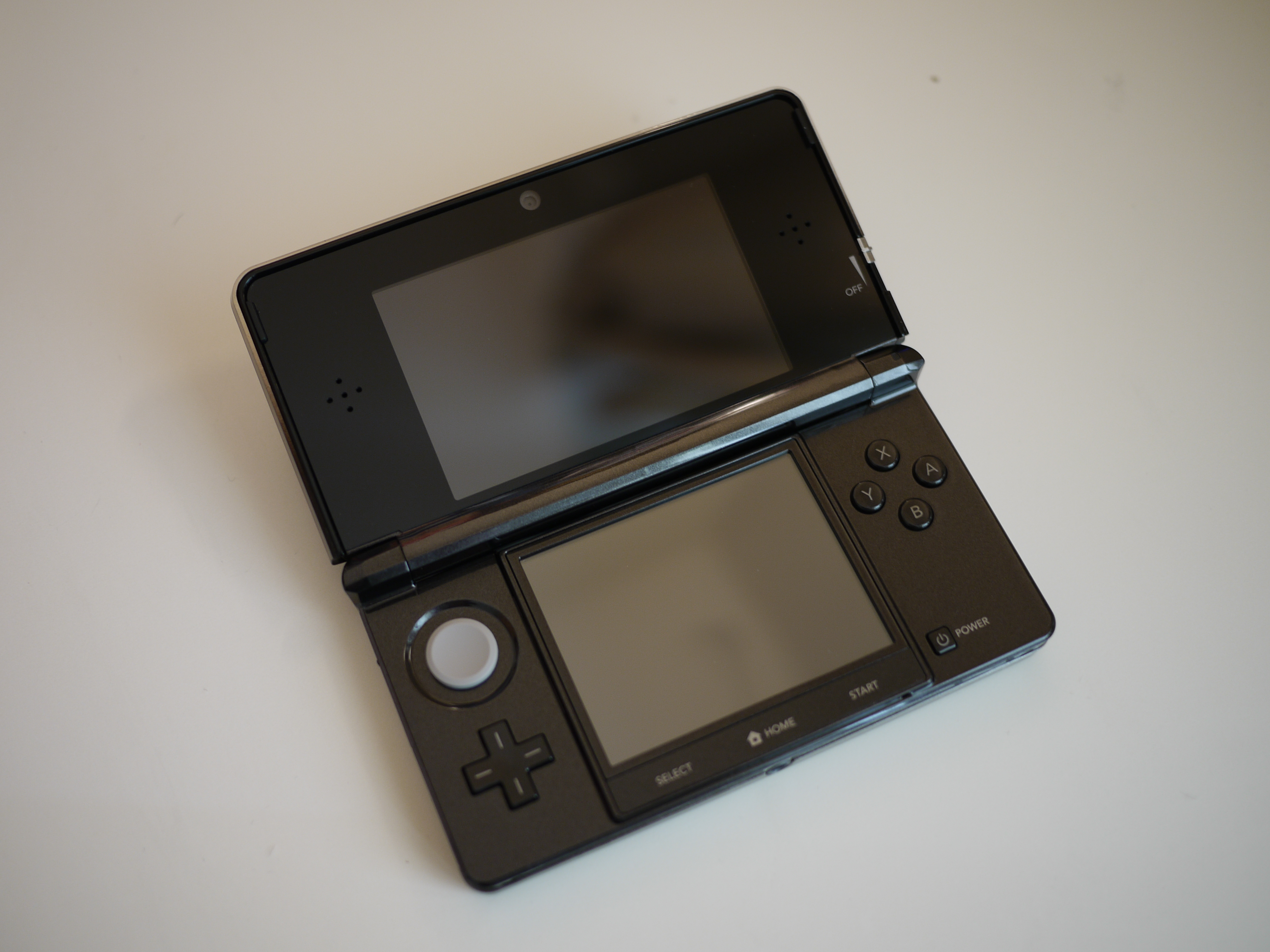 其實在昨天去買iPad 2的時候就順便買，但懶得上傳圖片